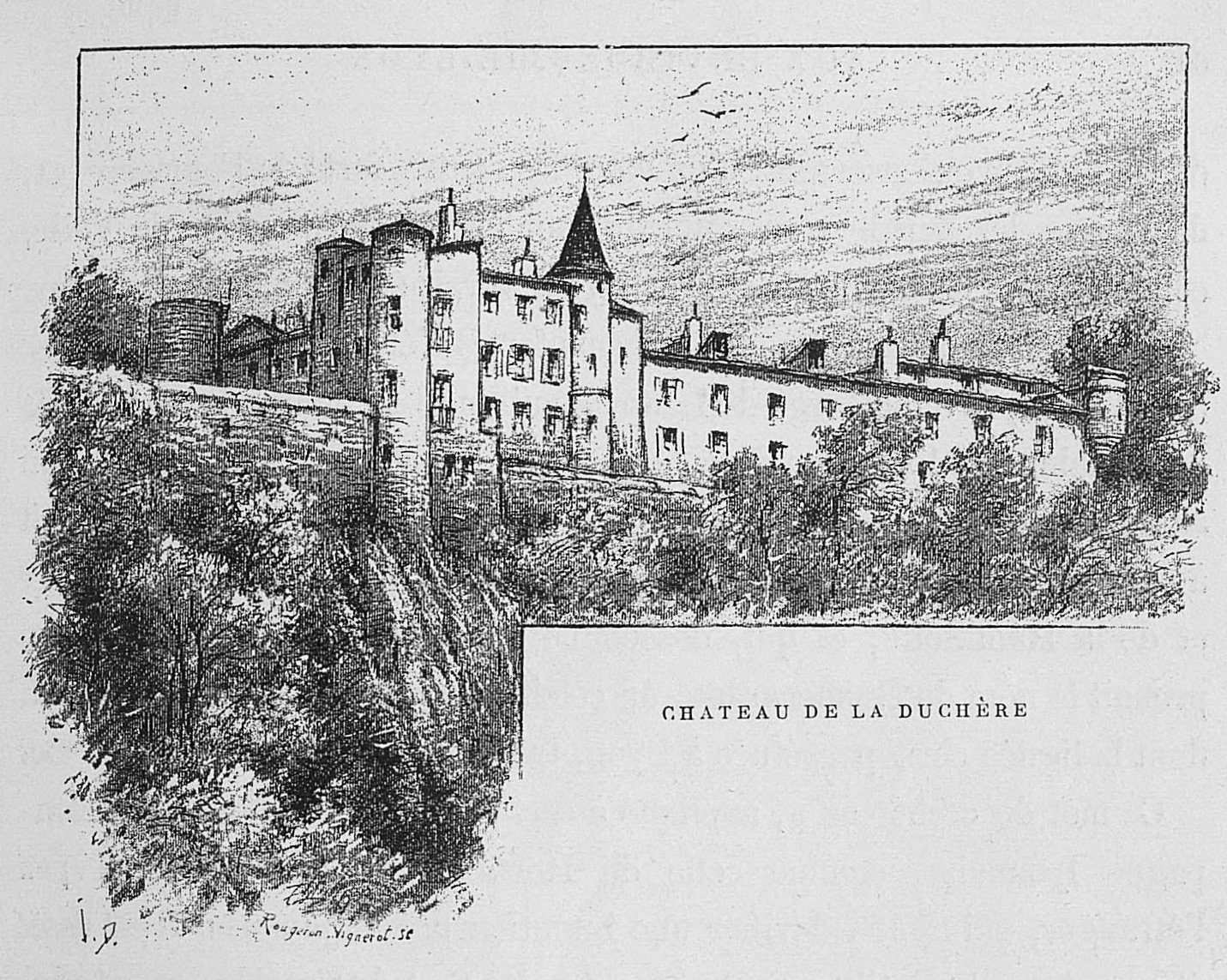 Aux environs de Lyon / Monsieur Josse ; préface de M. Coste-Labaume ; édition illustrée de 250 dessins de J. Drevet. Château de la Duchère à Lyon.